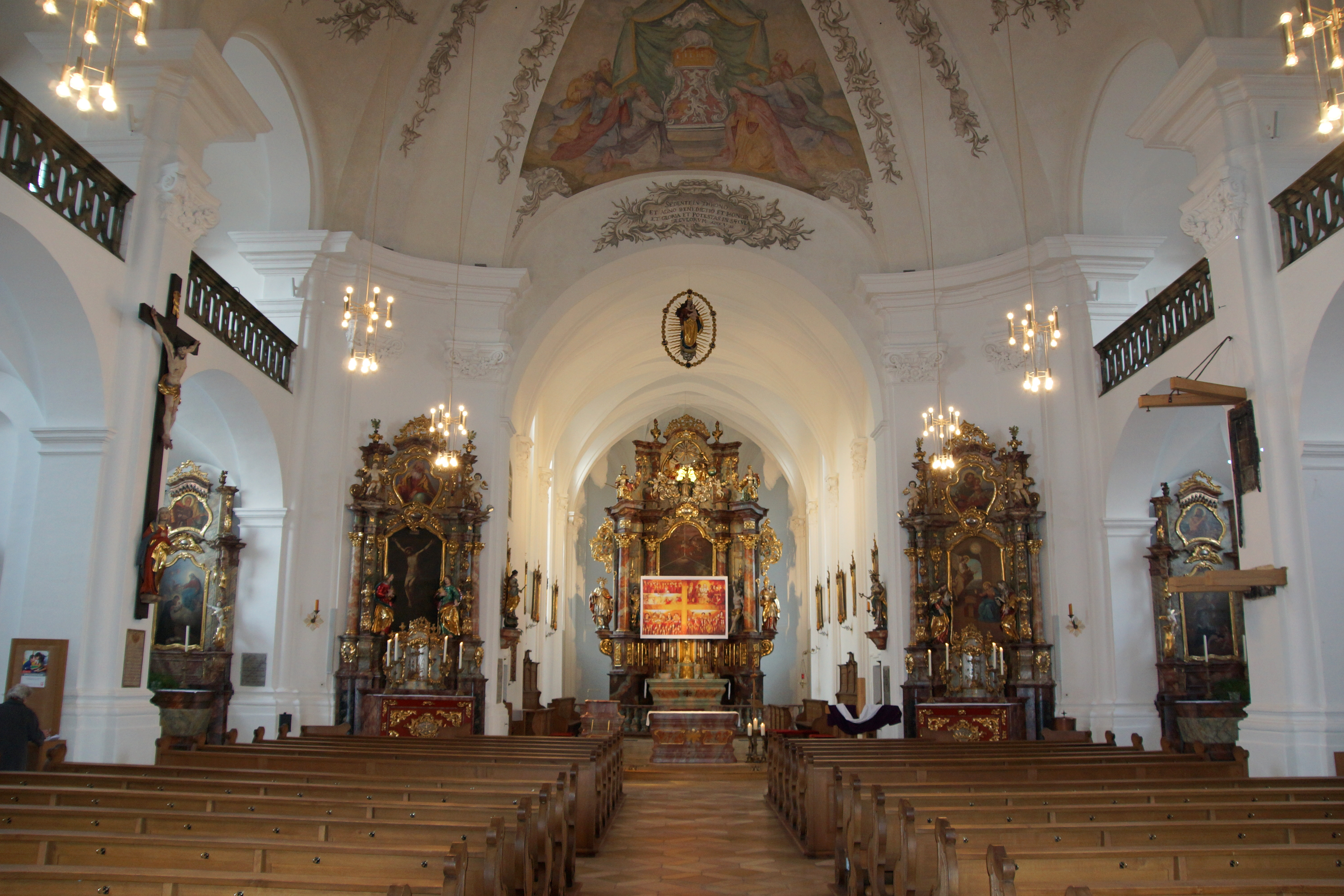 Die katholische Pfarrkirche St. Ägidius in Vilseck in der Oberpfalz